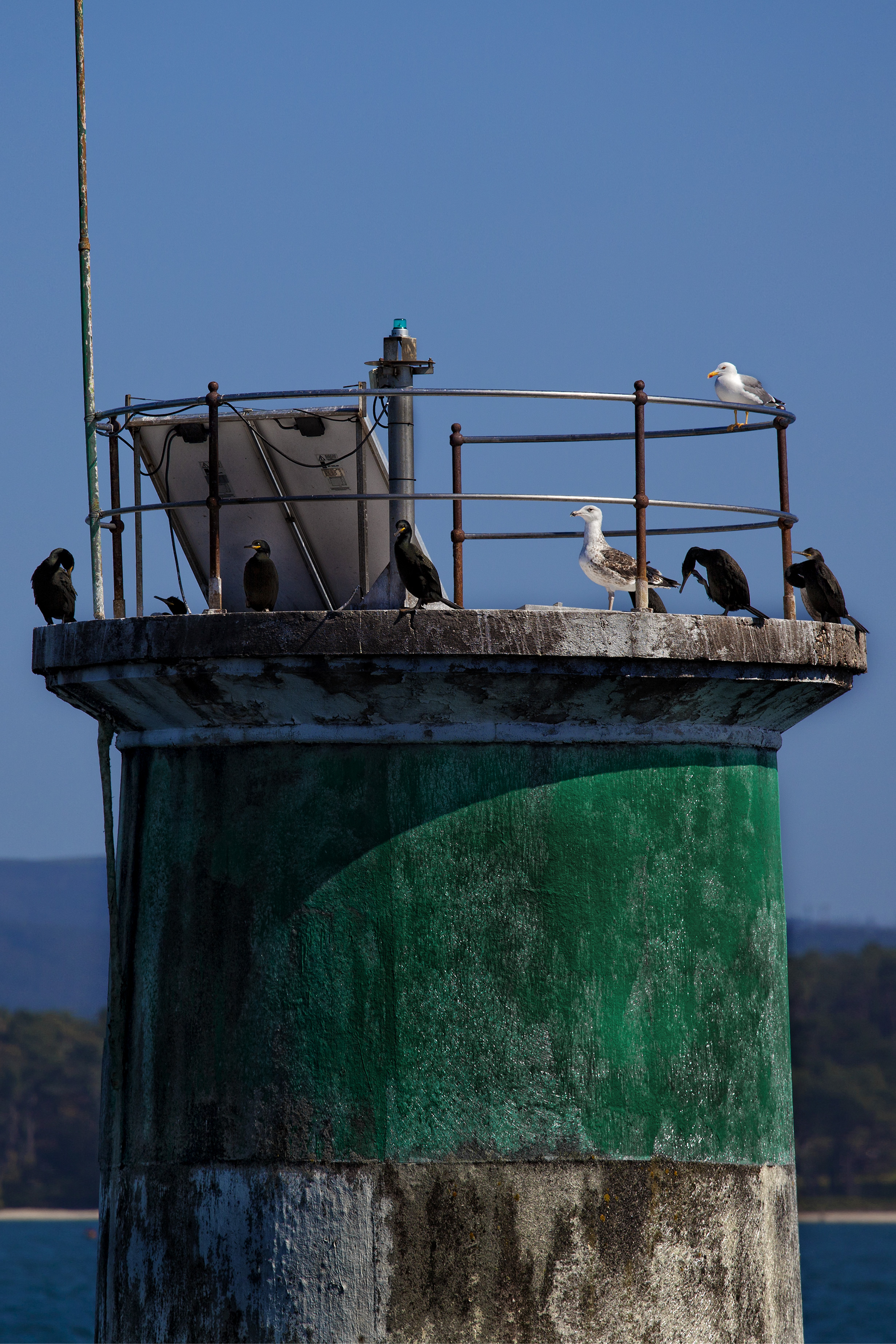 Corvos mariños cristados no Grove